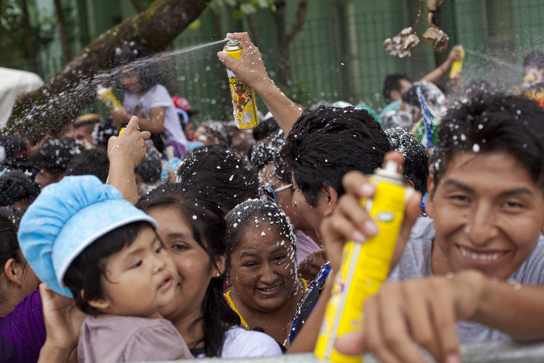 SAO PAULO, SP, BRASIL, 02-03-2014, 15h00: Brincadeira com espuma e tradicao no carnaval da comunidade boliviana em Sao Paulo. Rua Pedro Vicente, Armenia. (Foto: Ze Carlos Barretta)